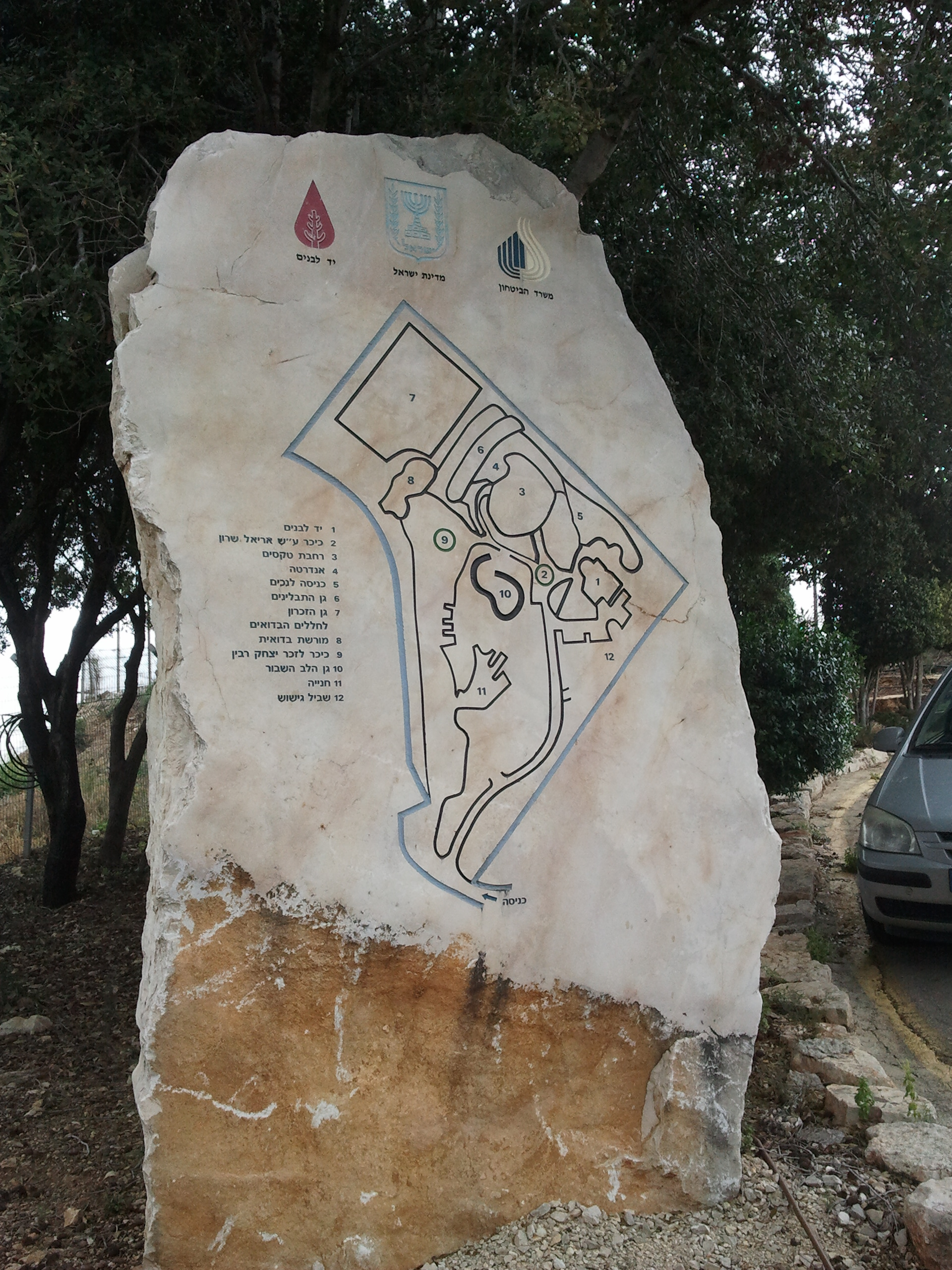 Bedouin Soldiers Memorial נדרטת הלוחם הבדואי נמצאת לצד כביש 77 (כביש המוביל) כקילומטר צפונית למחלף המוביל. מפת האתר